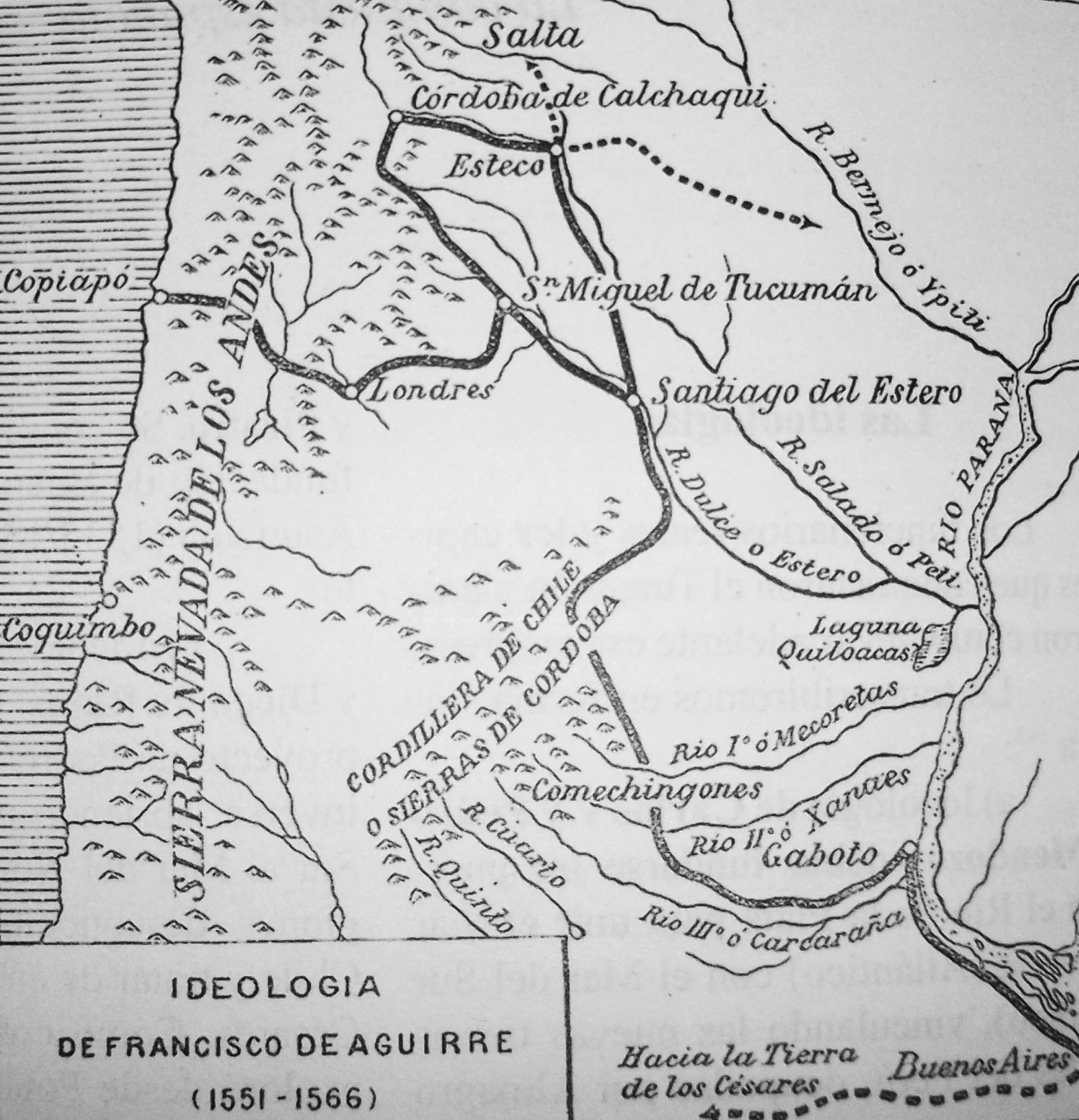 Planificación que realizó Francisco de Aguirre para conquistar el Tucumán y el Río de la Plata entre 1551 y 1566.